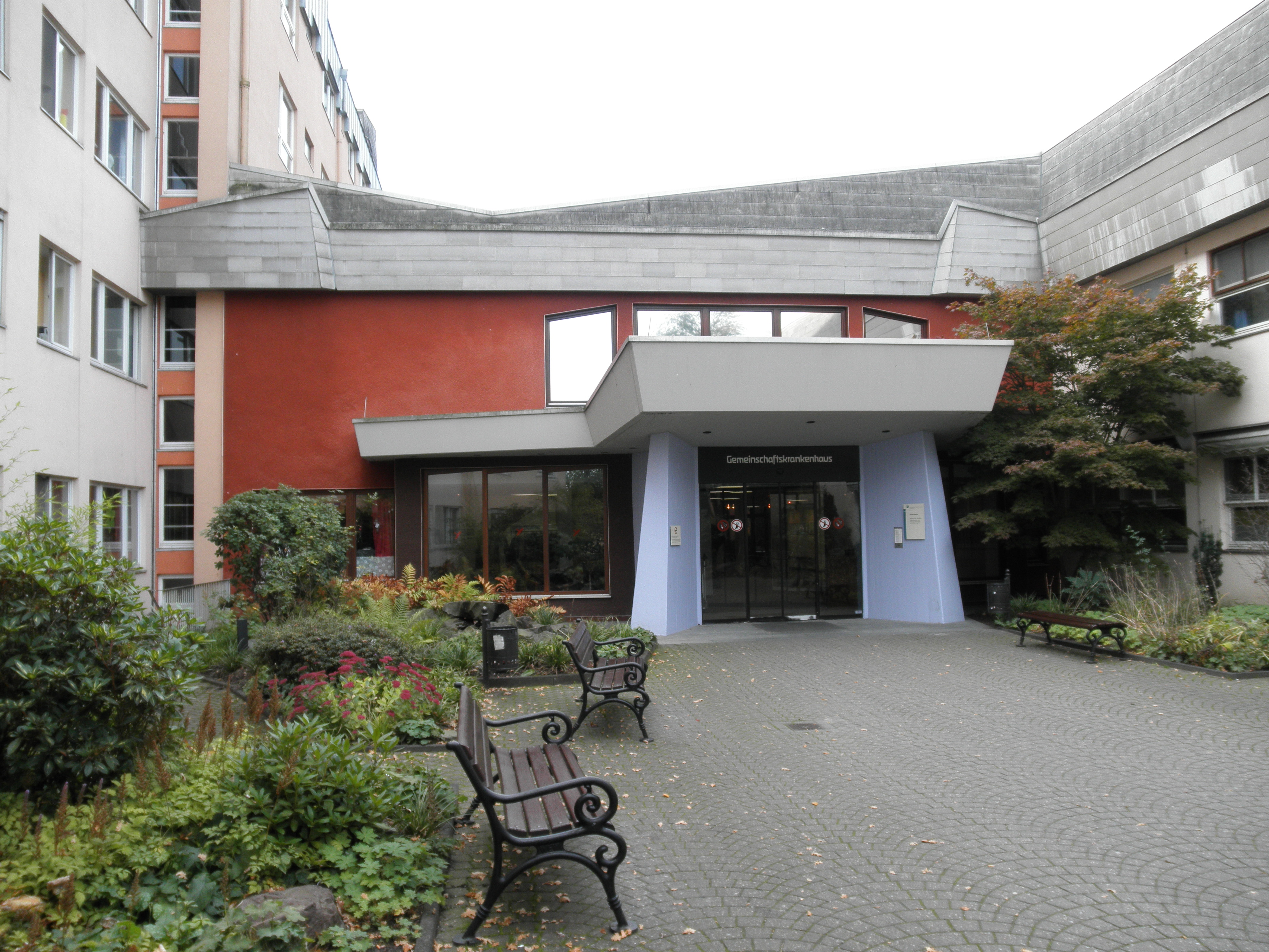 das antroposophische Gemeinschaftskrankenhaus Herdecke im Herbst 2010